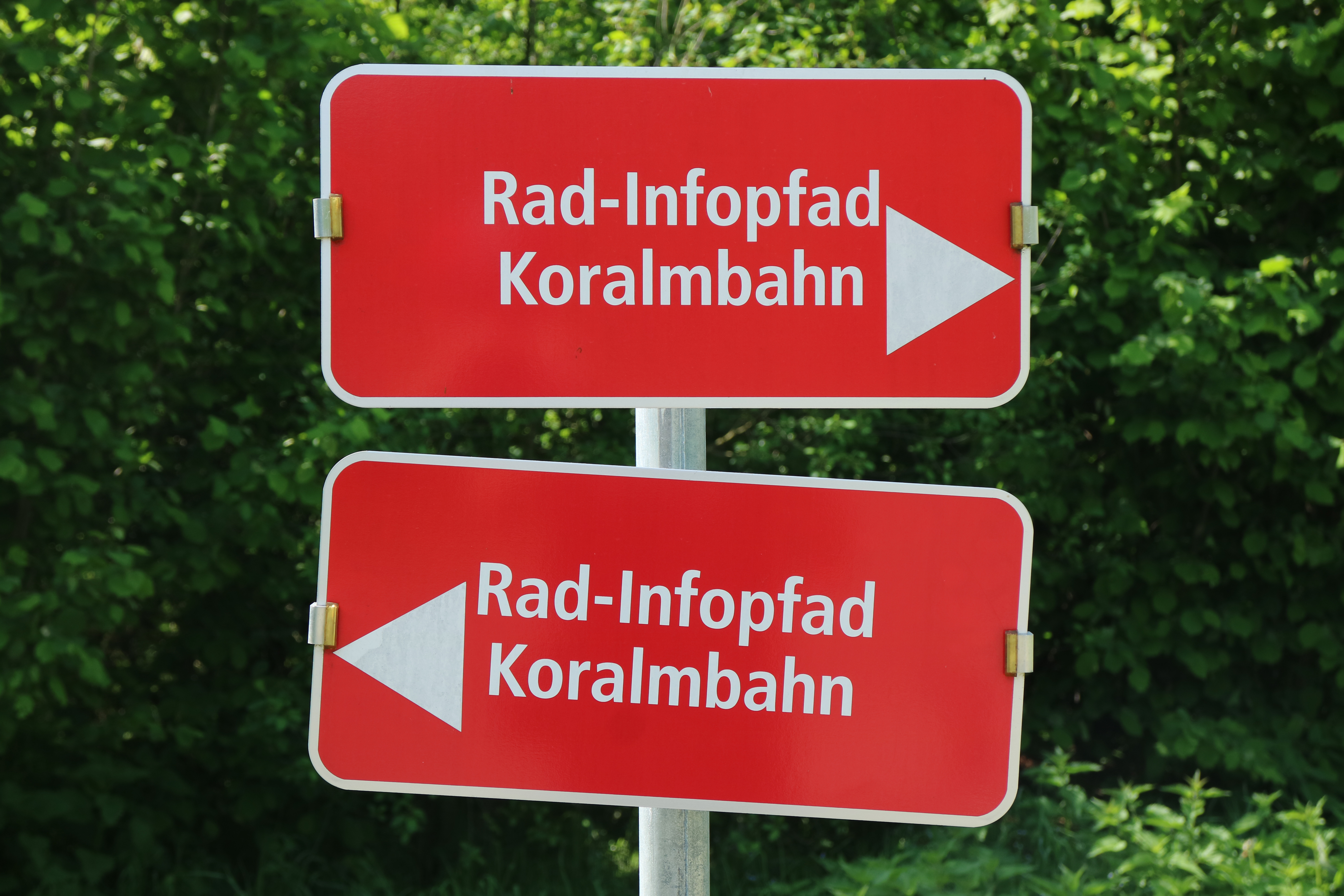 Wegweiser am Rad-Infopfad Koralmbahn, Gemeinde Wildon (Steiermark)